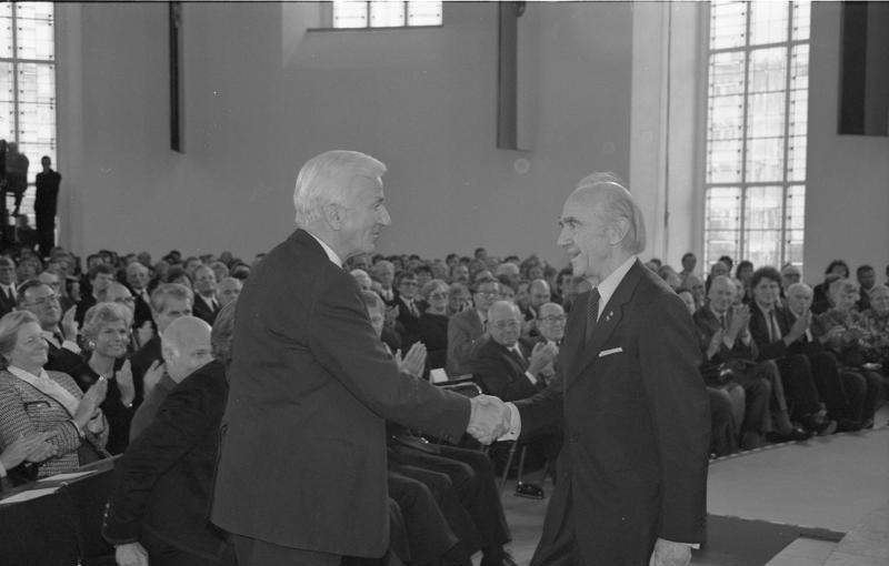 Frankfurt, 7. Oktober 1990 Der Direktor des Deutschen Polen-Instituts, Dr. Karl Dedecius, wurde in der Frankfurter Paulskirche mit dem diesjährigen Friedenspreis des Deutschen Buchhandels ausgezeichnet.